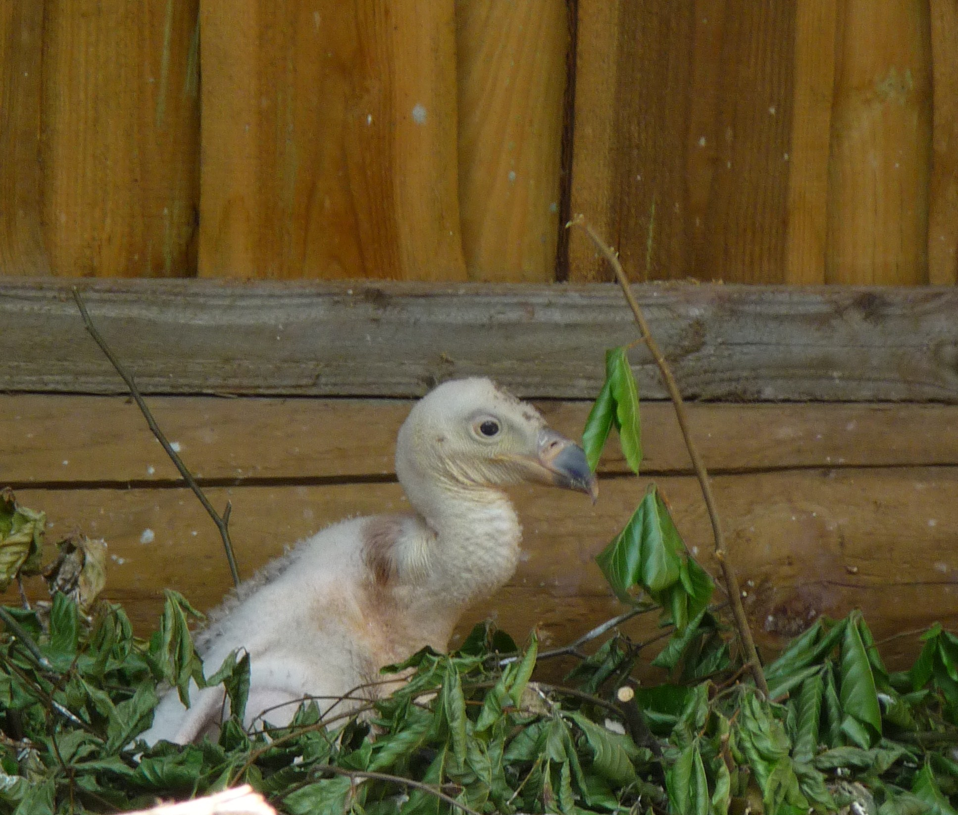 Nestling eines Sperbergeiers (Gyps rueppellii) im Wildpark Tripsdrill (Baden-Württemberg Deutschland)